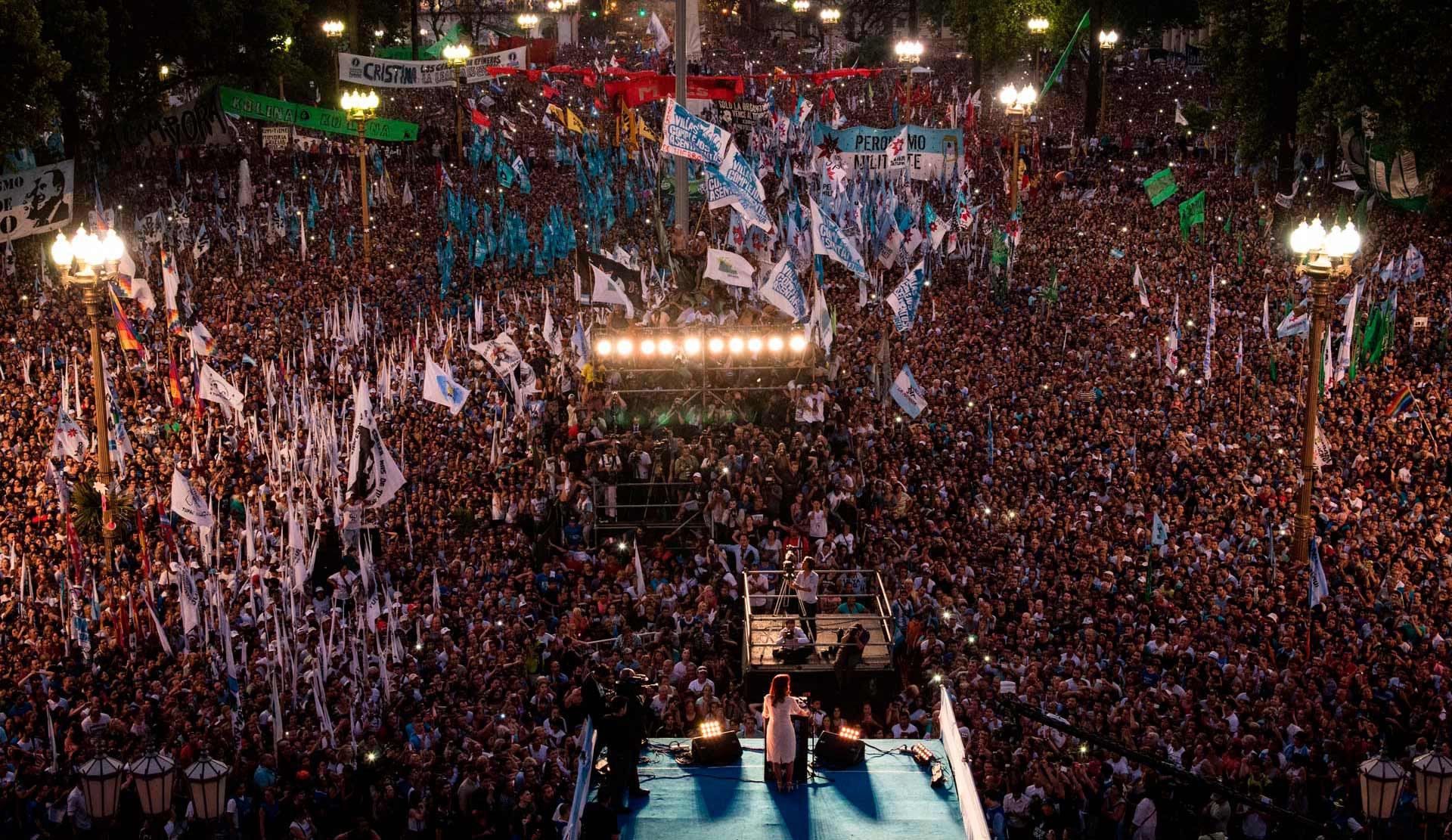 Populus Argentinus Christinae praesidi suae salutem dicit ultimo die magistratus eius, 9 Decembris 2015